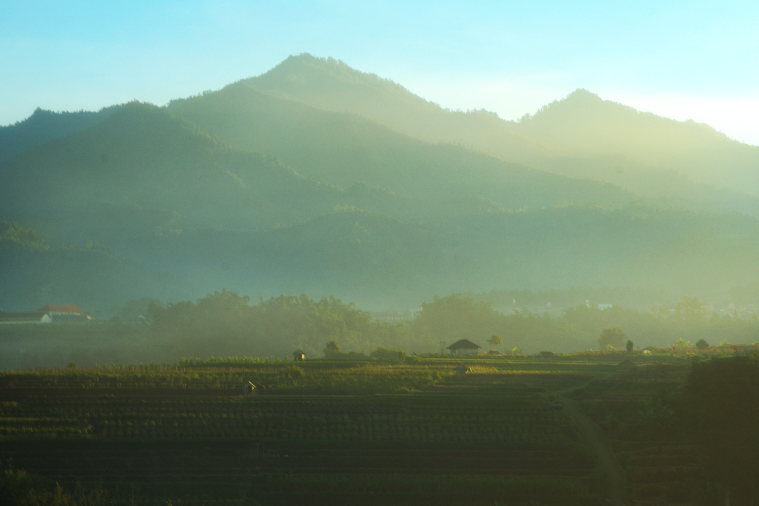 Ini adalah foto gunung Anjasmoro di pagi yang terlihat dari Pujon , Malang